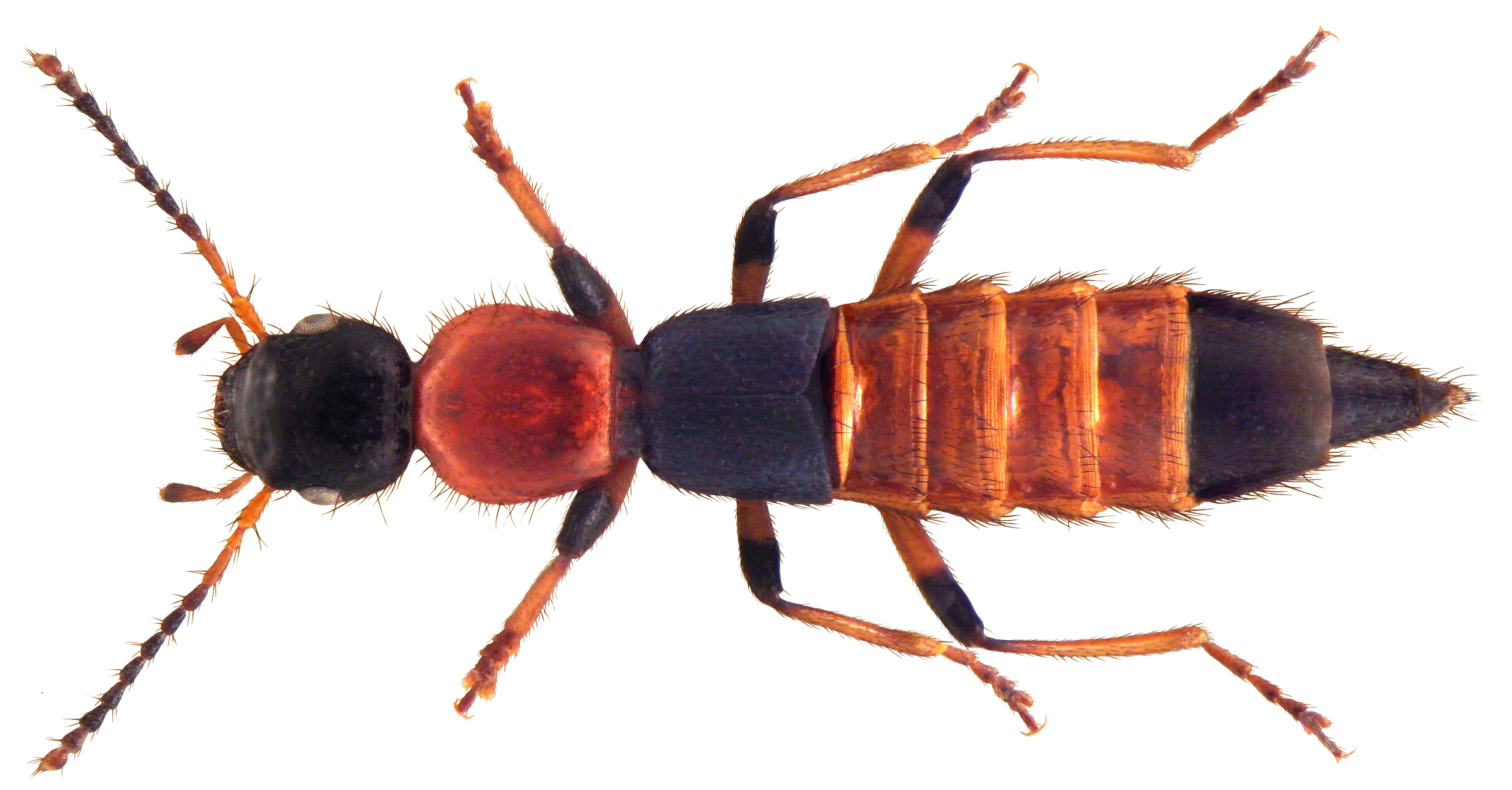 Familie: Staphylinidae Groesse: 8,5-10 mm Verbreitung: Europa Ökologie: an Ufern von Gebirgsflüssen Fundort: Austria, Leitha-Gebirge, Donnerskirchen leg.det. U.Schmidt, 1975 Photo: U.Schmidt, 2010